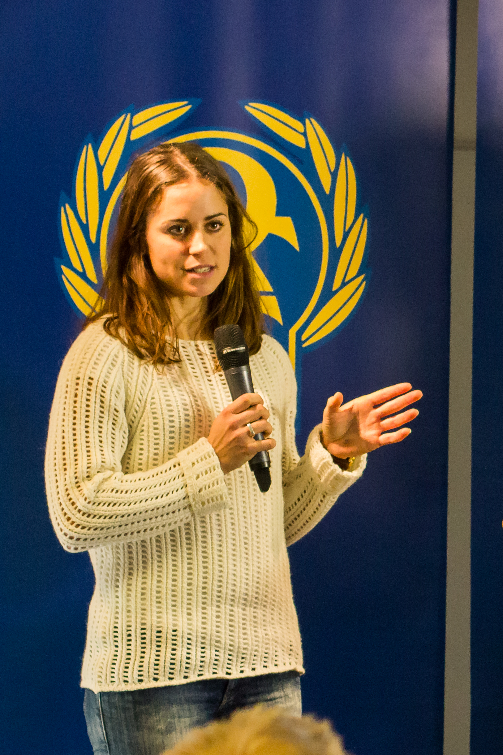 Längdskidåkaren Anna Haag intervjuad av Gunilla Wikström om projektet Fast and Female på SM-veckan 2013:s presskonferens.